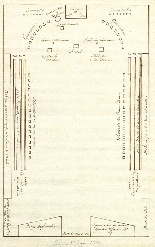 Tekening uit 1809 met daaronder in potlood de tekst "le 15 juin 1809 Amsterdam". afgedrukt in de tentoonstellingscatalogus "Lodewijk Napoleon". Het Loo 2007. Deel van de collectie van het Rijksmuseum Paleis het Loo. De auteur, een ceremoniemeester of andere hoveling moet al mer dan een eeuw geleden gestorven zijn.